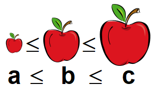 Diese Datei ist eine Modifikation von File:Relacion transitiva.svg